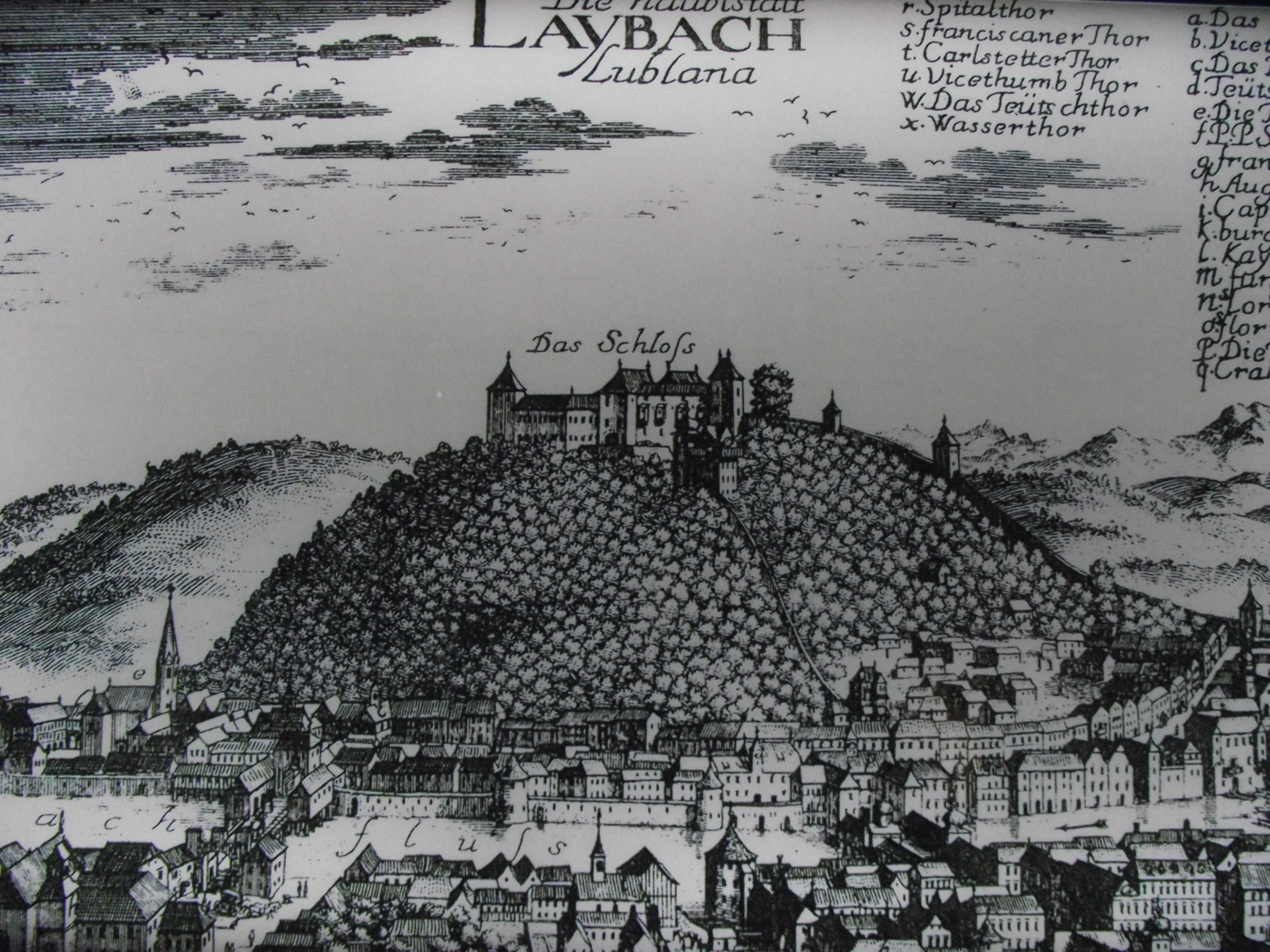 Ljubljana